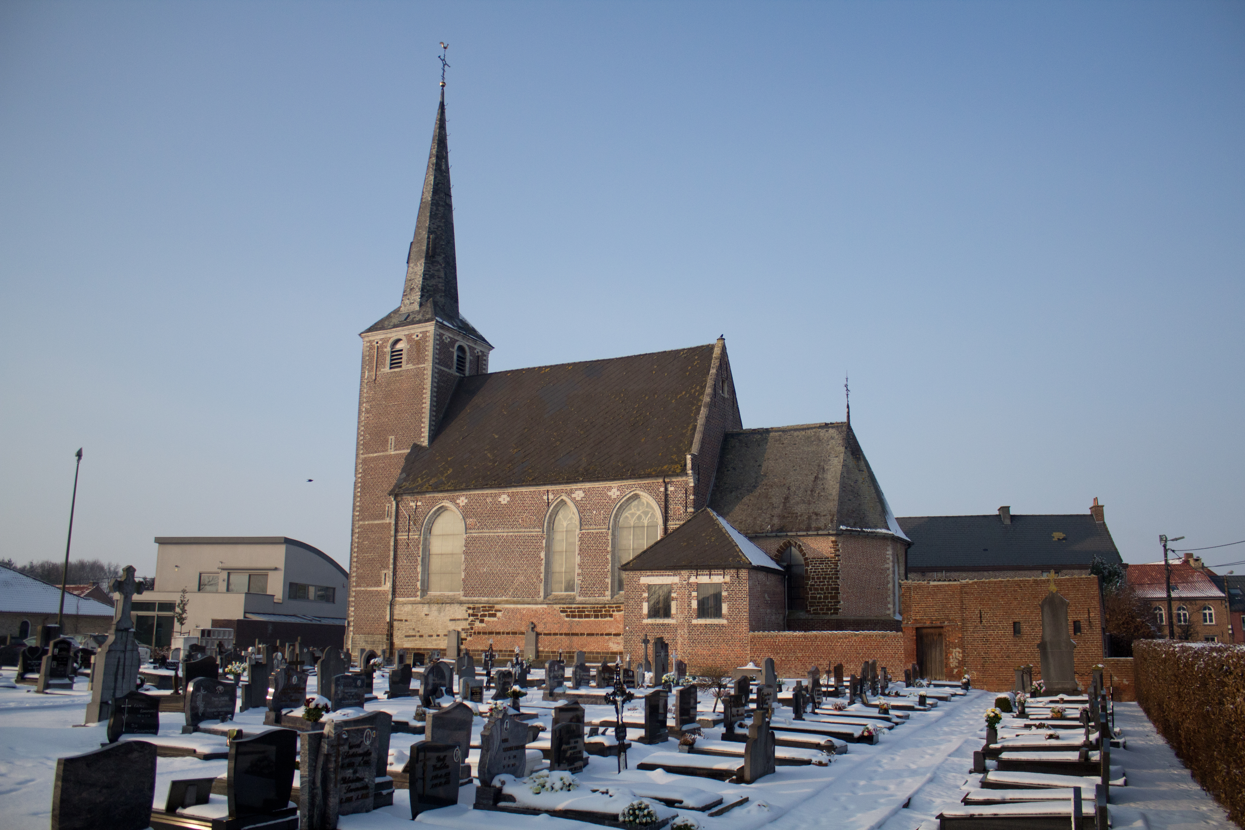 Parochiekerk Sint-Mattheus, Meensel-Kiezegem